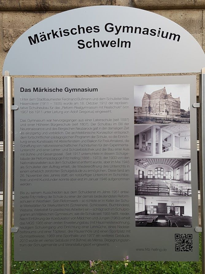 Gedenktafel an Fritz Helling vor dem Märkischen Gymnasium Schwelm (MGS). Aufgestellt im Juli 20016